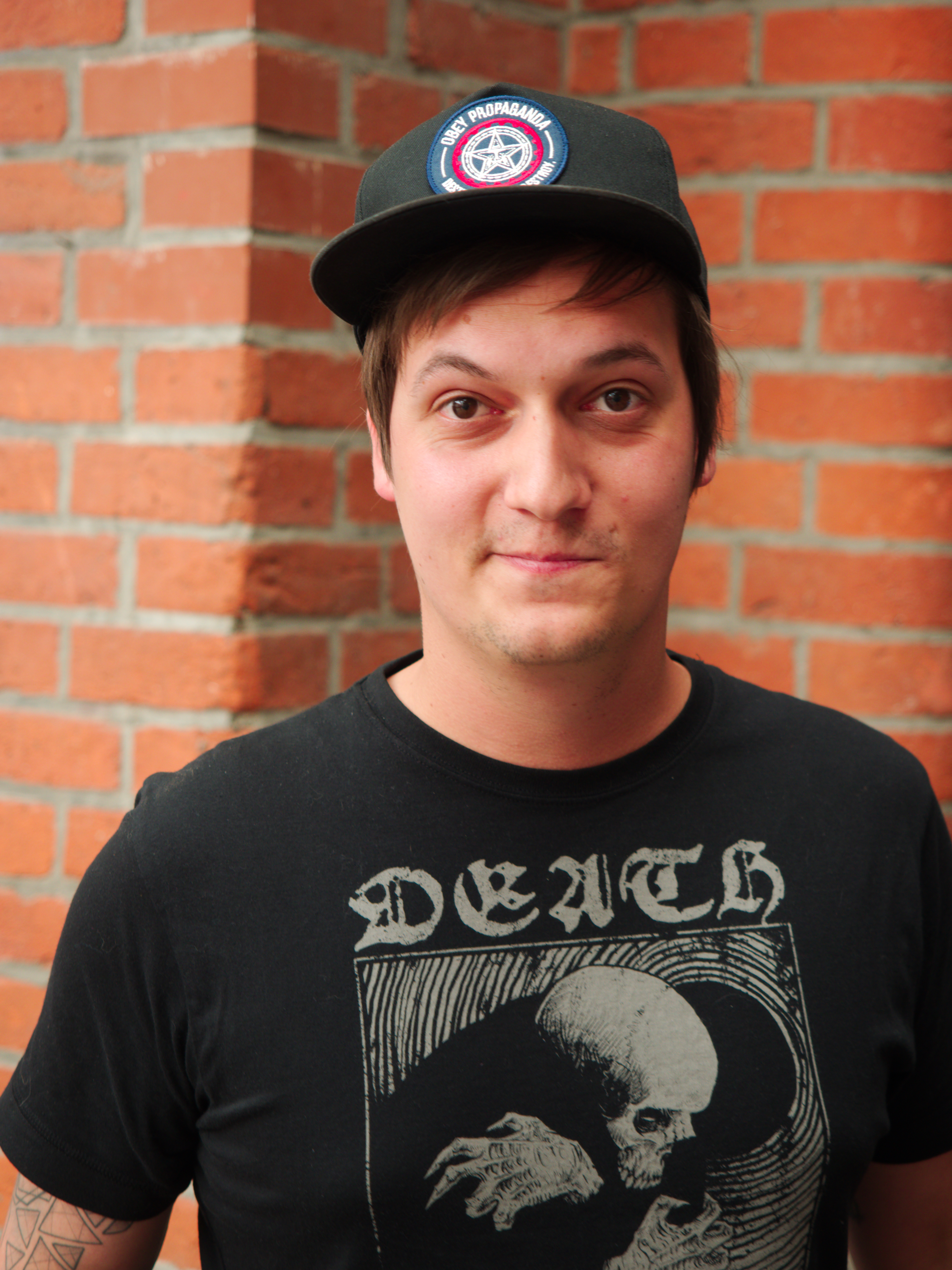 LeFloid auf der re:publica 2015